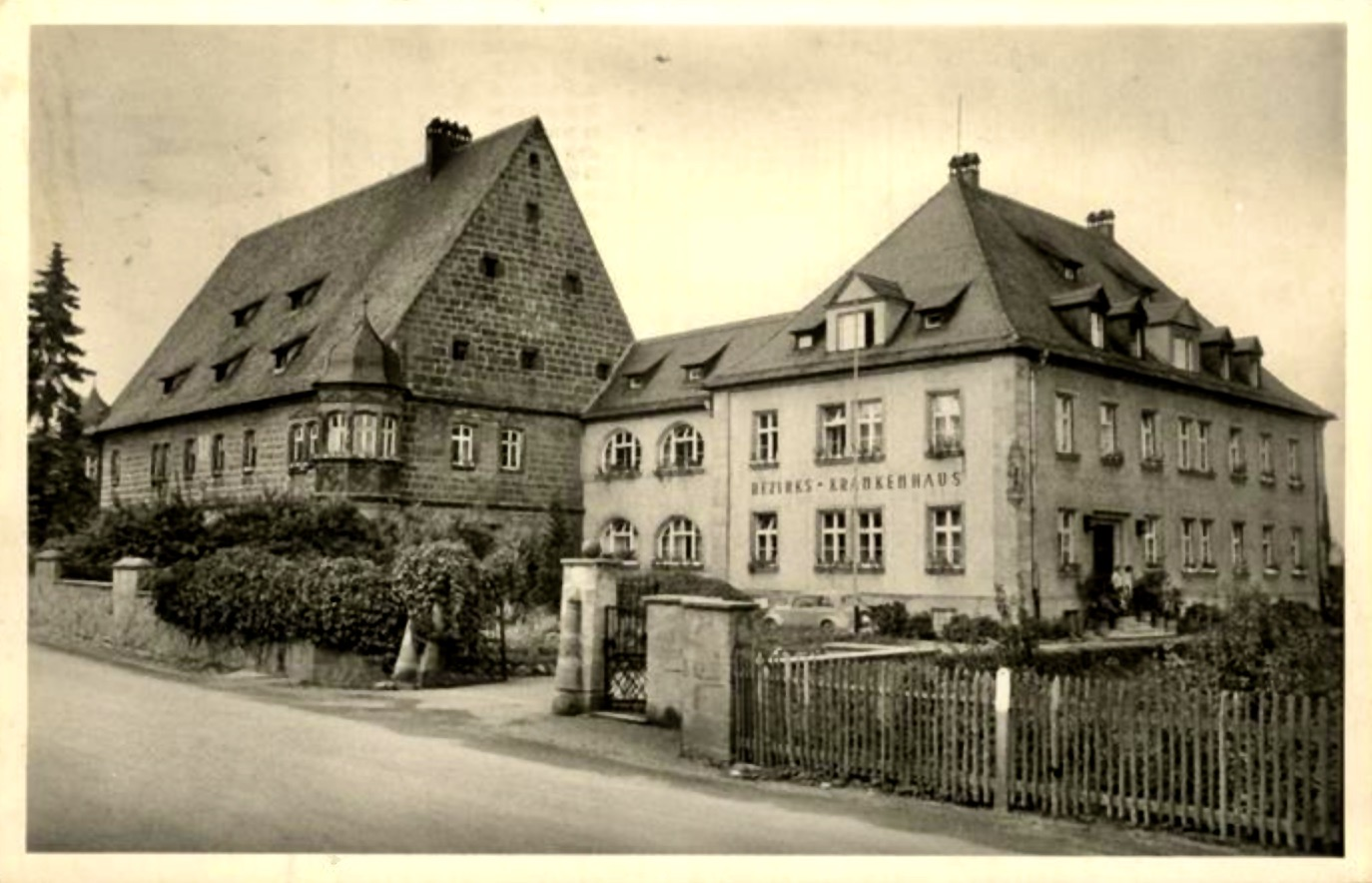 Ansicht des Bezirkskrankenhauses Hochstadt in Oberfranken